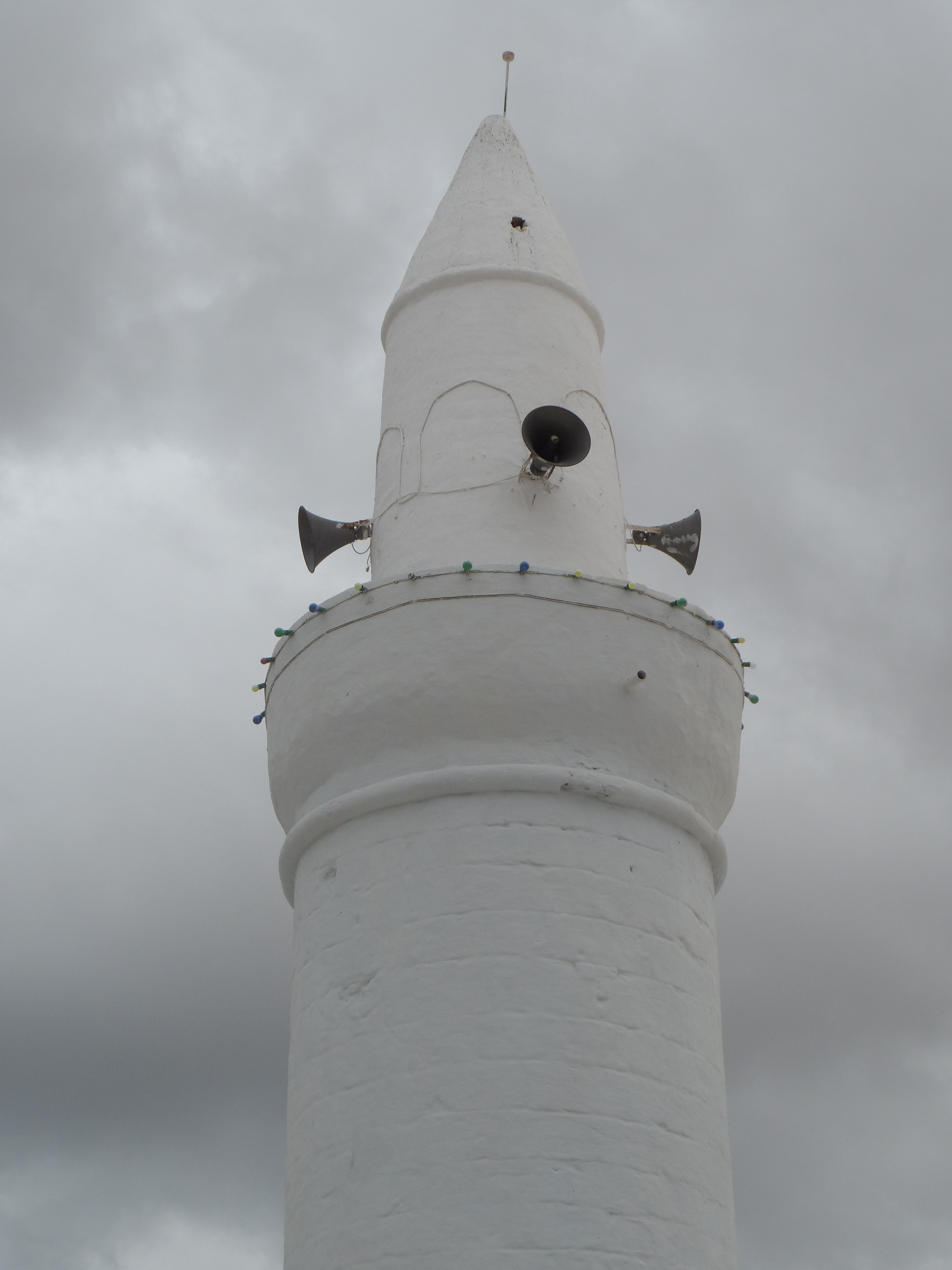 Mosquée des Turcs, Houmt Souk